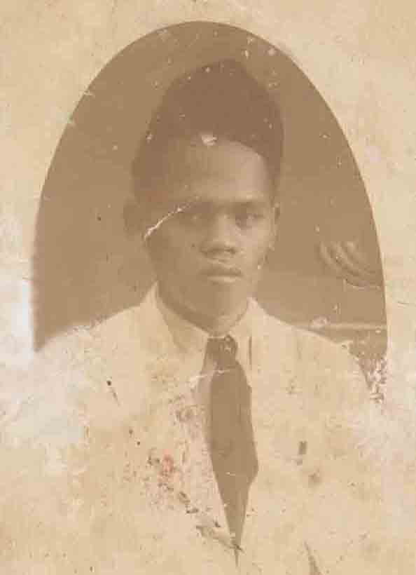 Pemimpin Barisan Selempang Merah Kuala Tungkal 1949